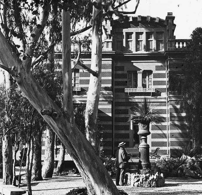 Casa de Santa Teresa a Vilanova i la Geltrú. Josep Salvany i Blanch (1912)